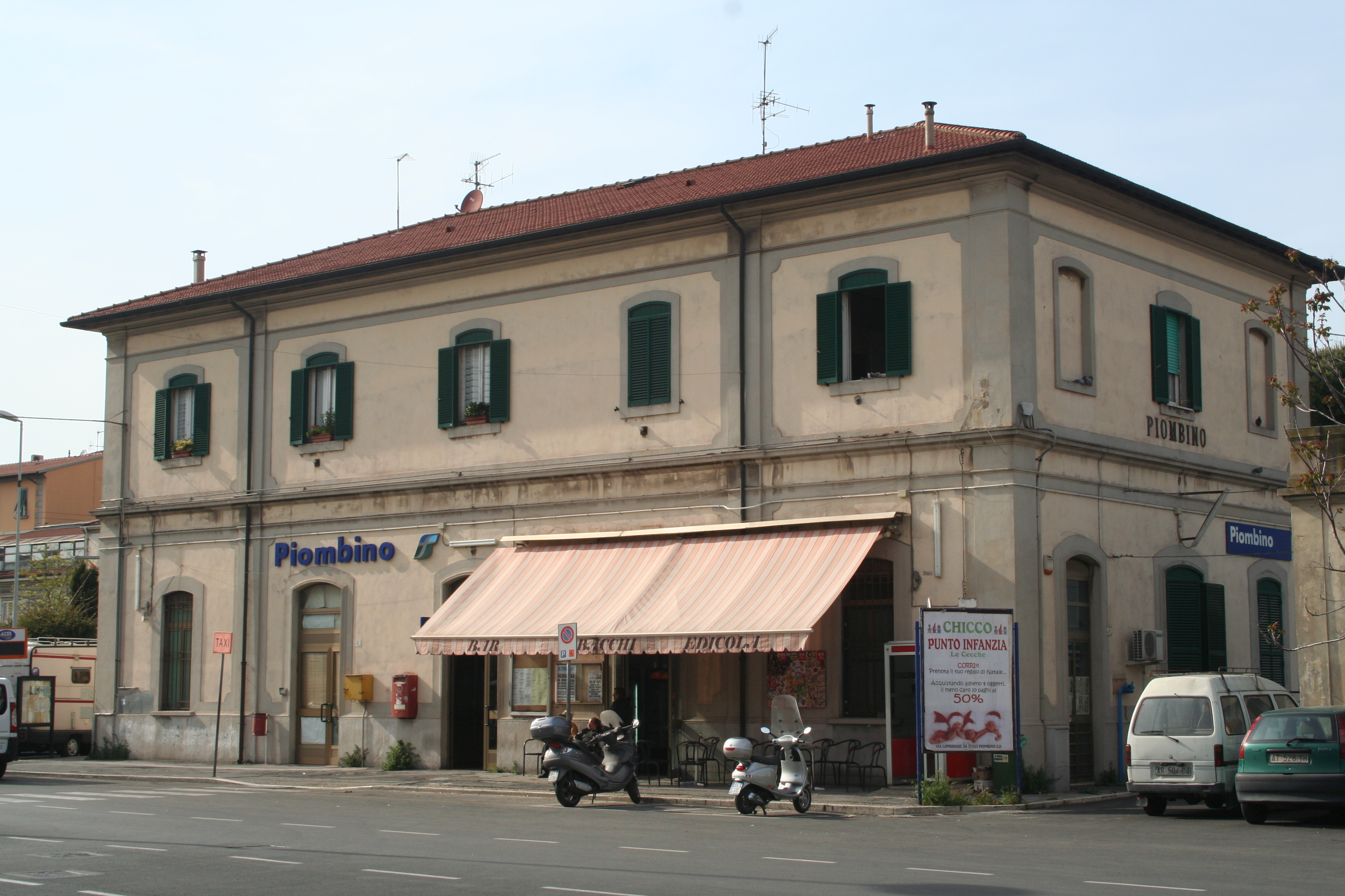 Lato campagna della stazione di Piombino